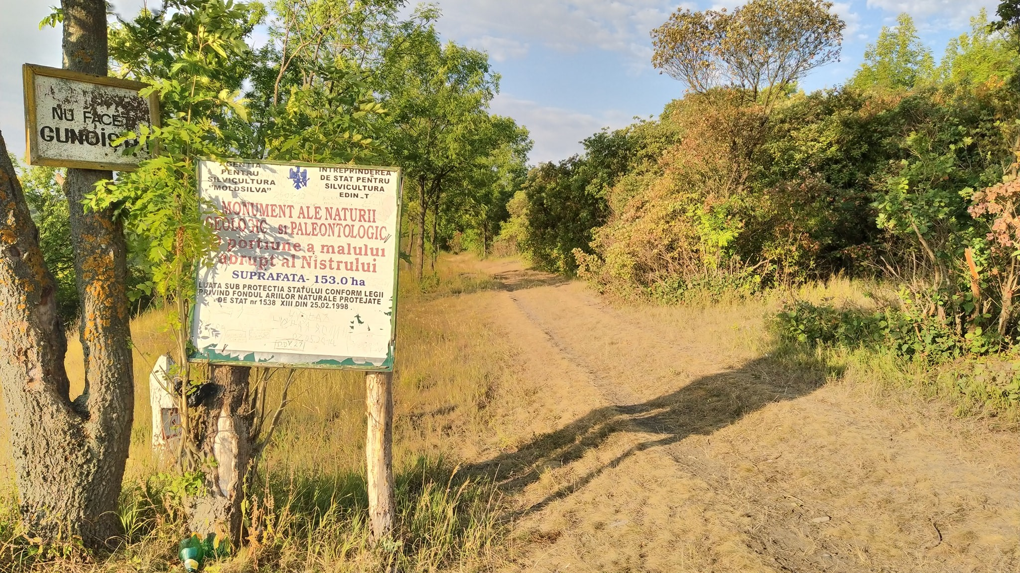 Panou informativ al monumentului naturii „O porțiune a malului abrupt al Nistrului”, la nordul Republicii Moldova în preajma satelor Naslavcea și Verejeni